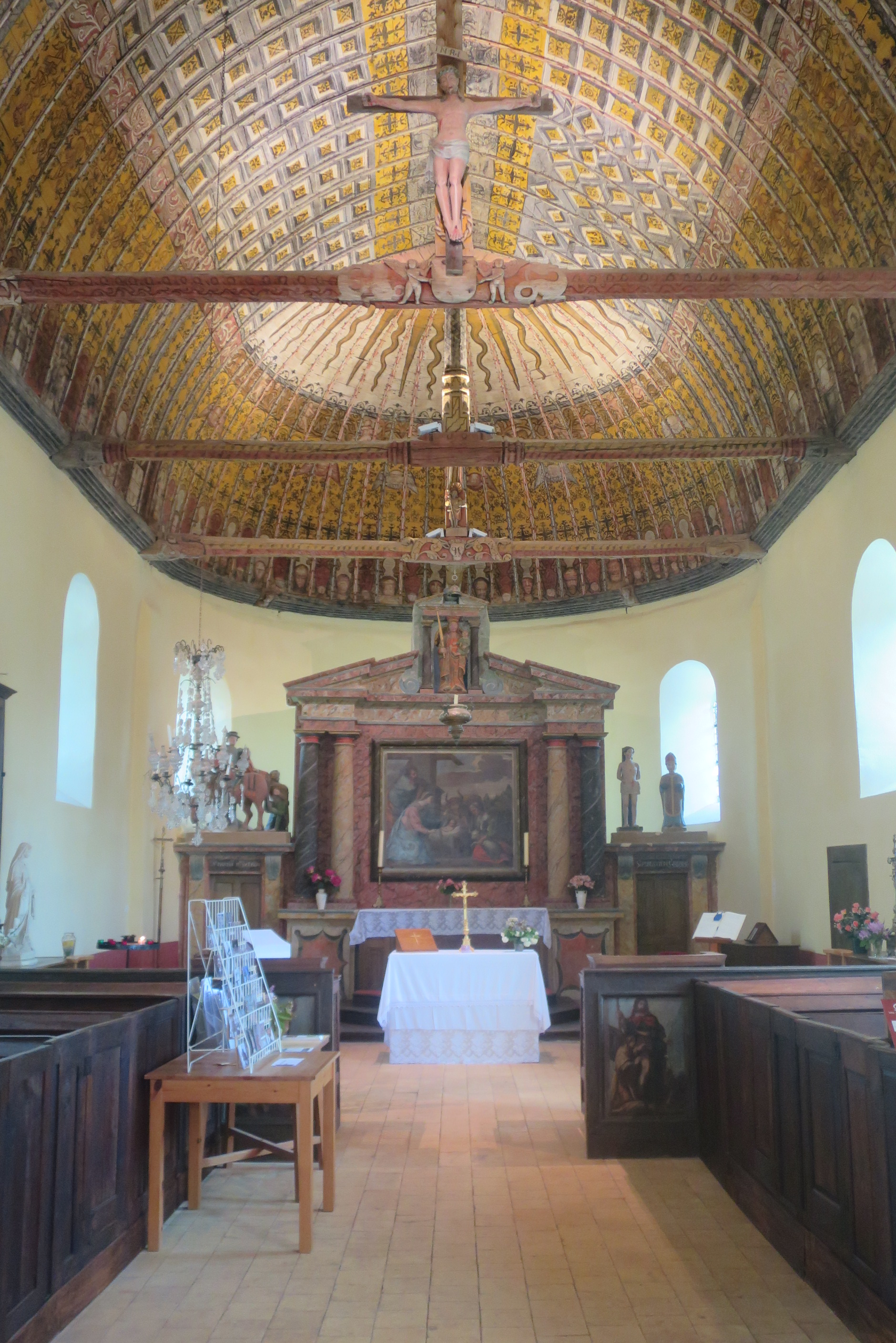 Eglise Saint-Martin de La Croix-du-Perche et sa charpente ornée de 1537